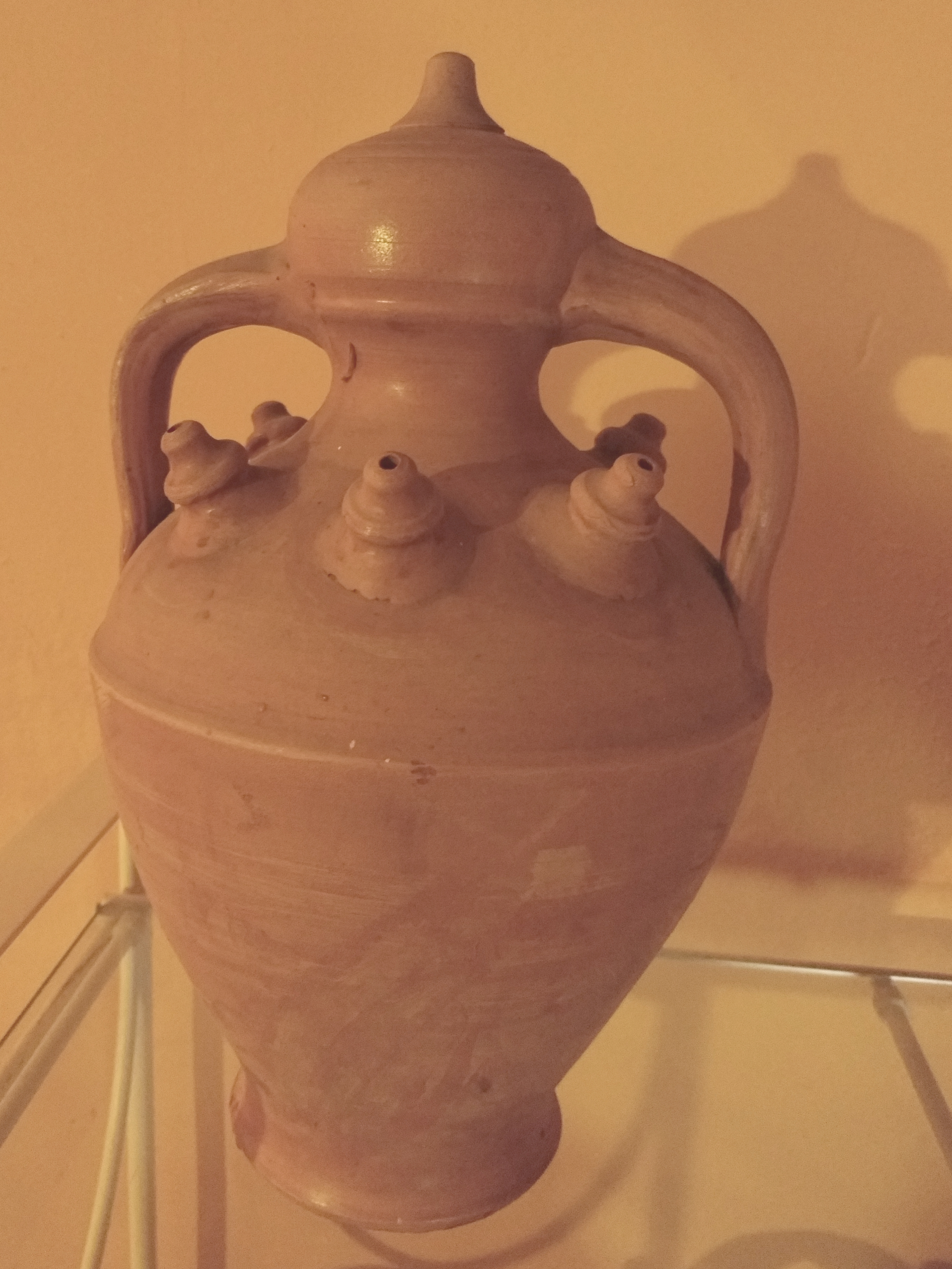 Aragonés: o botico castiello de Magallón estió feito en o barrio de Quez